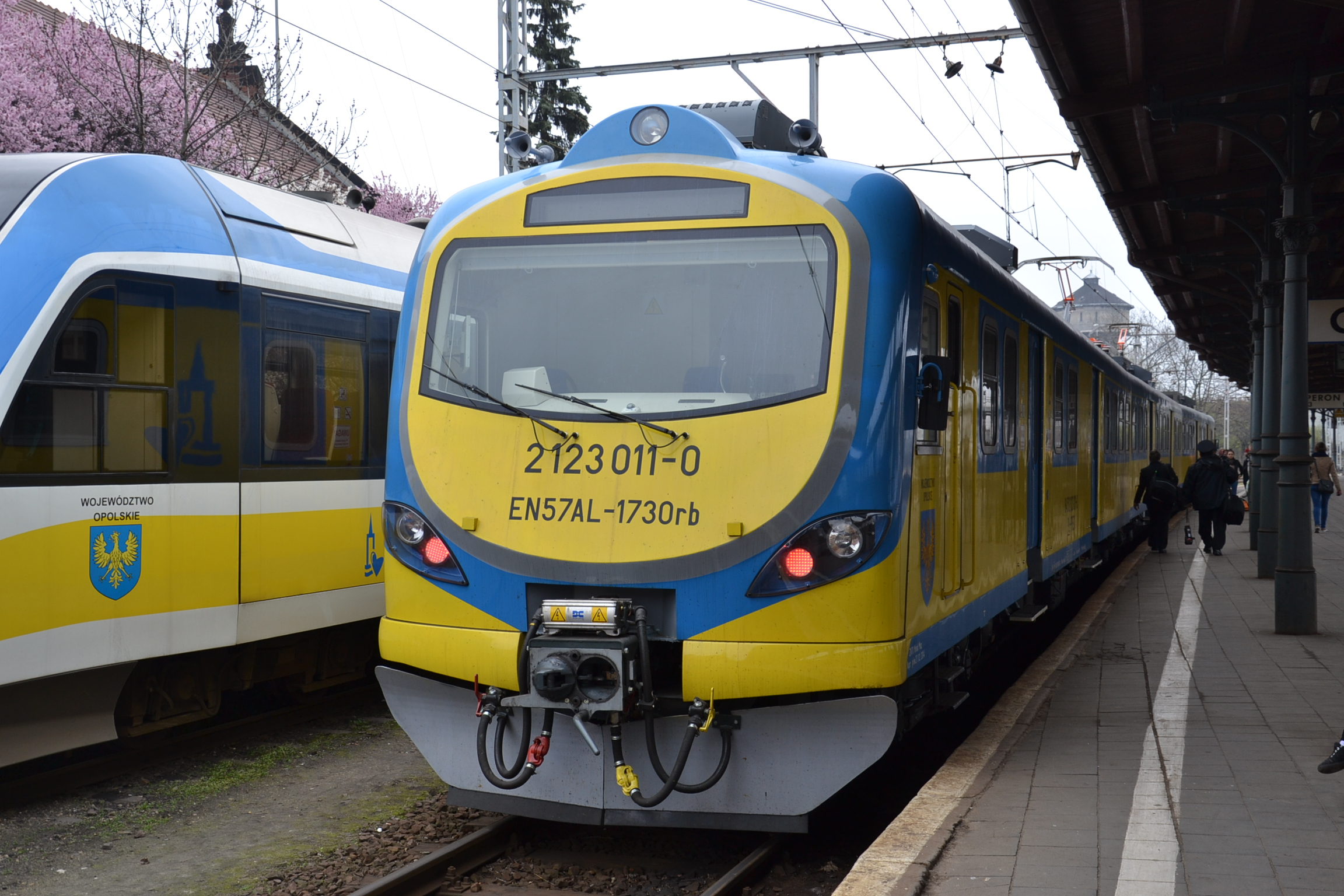 Zmodernizowany EN57 w barwach woj. opolskiego w Opolu